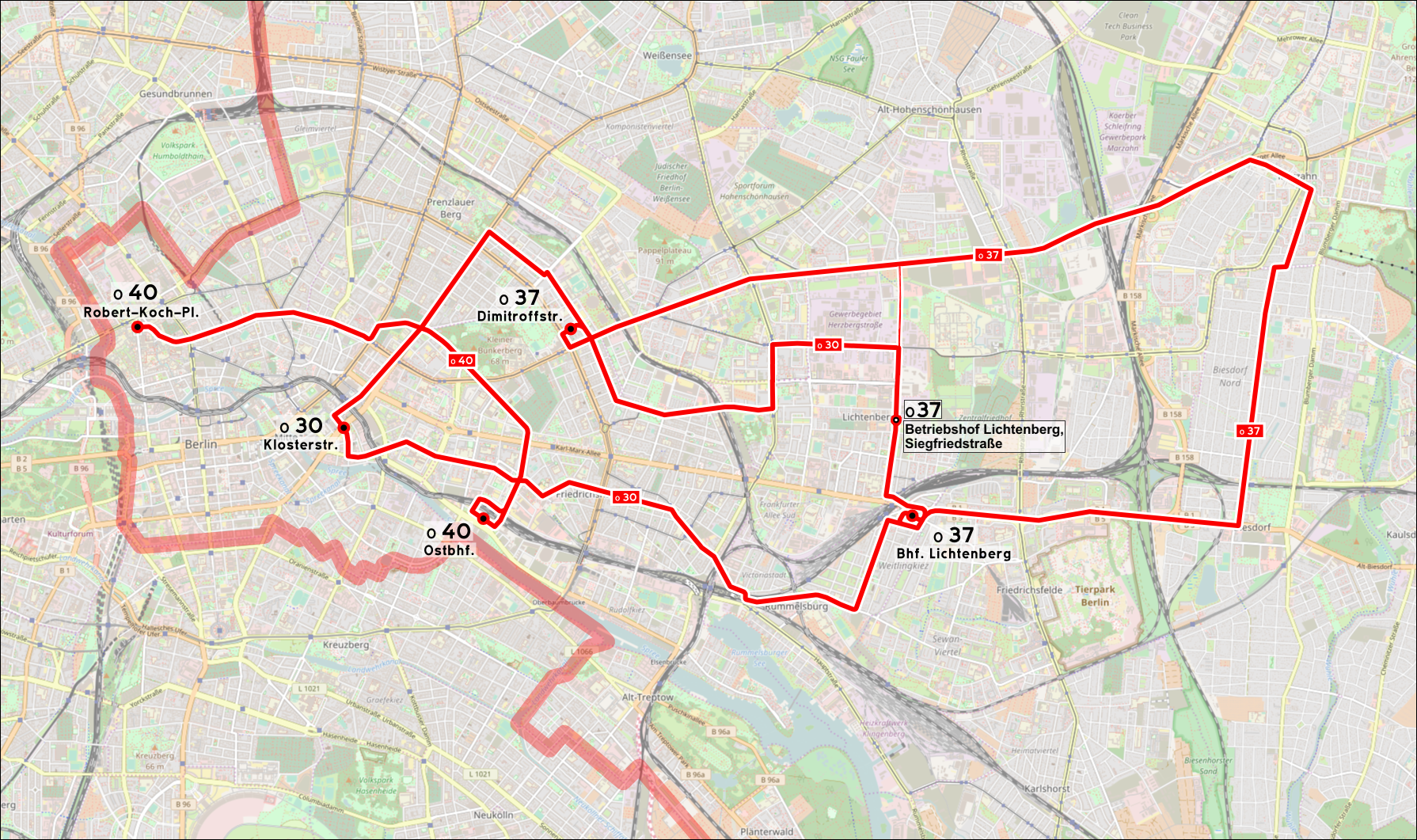 Karte des Ost-Berliner Obusnetzes 1961.